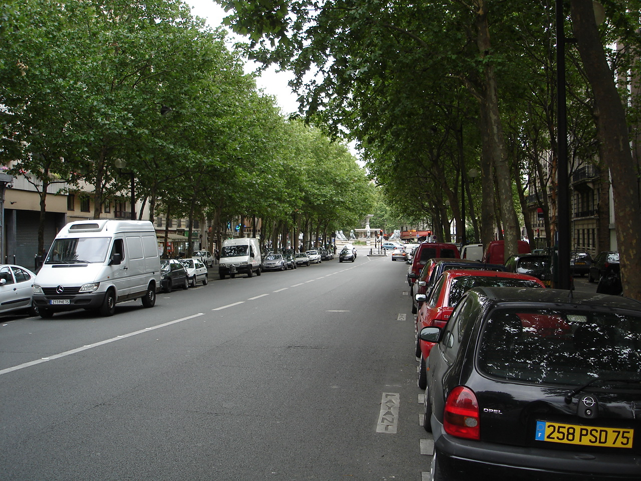 Rue de Reuilly (Paris - 12e arrondissement)